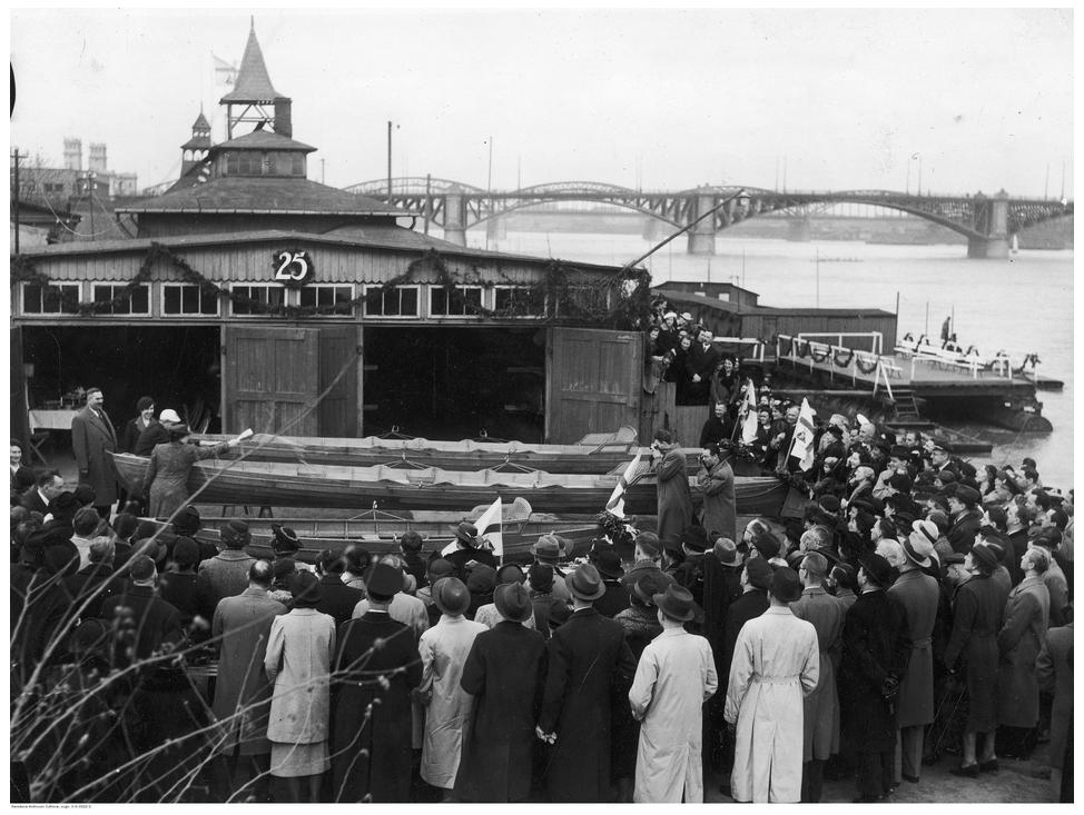 Jubileusz 25 lecia Warszawskiego Klubu Wioślarek. Chrzest łodzi na przystani klubu. W głębi widoczny most Poniatowskiego. Maj 1938 r.